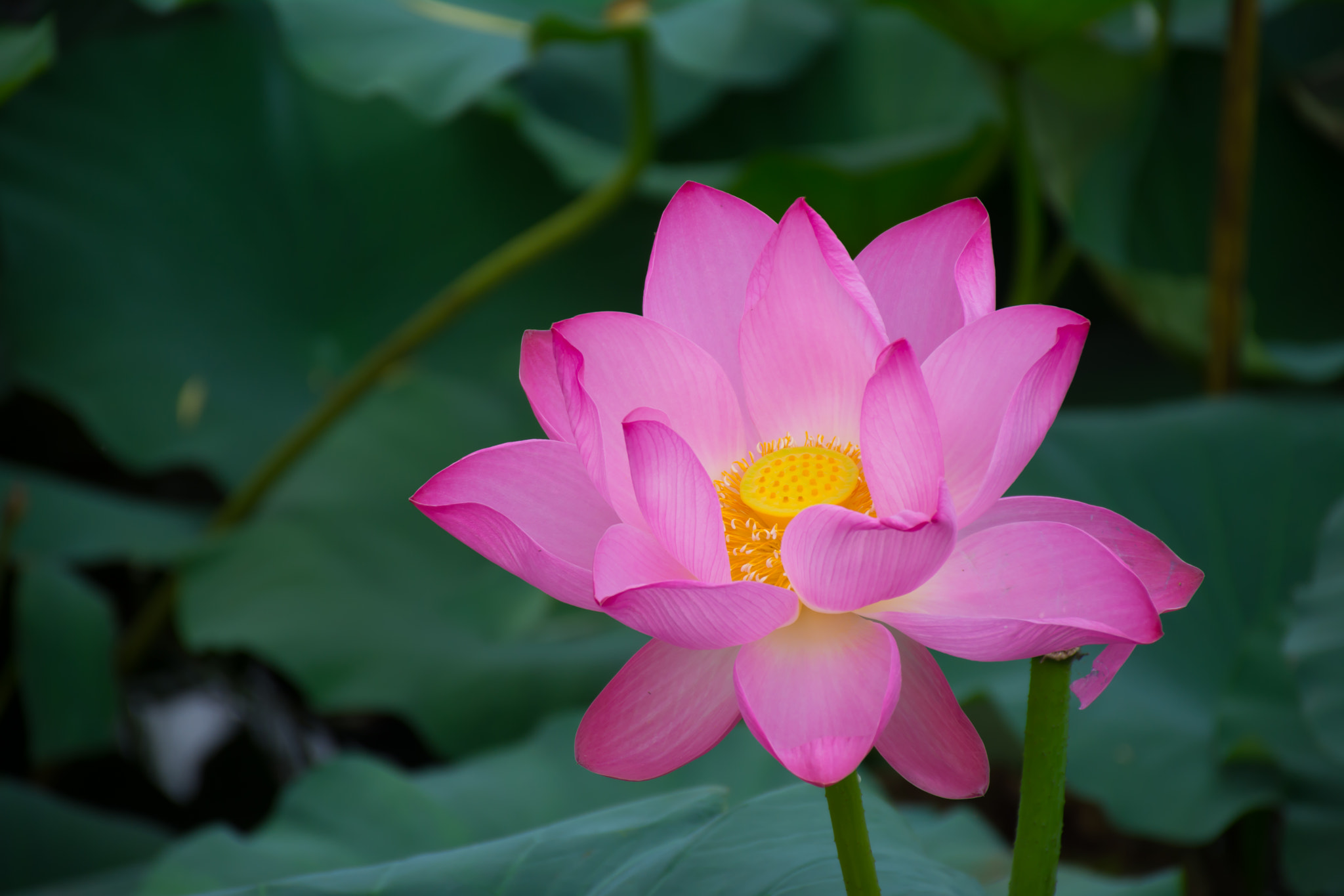 500px provided description: lotus [#lotus]